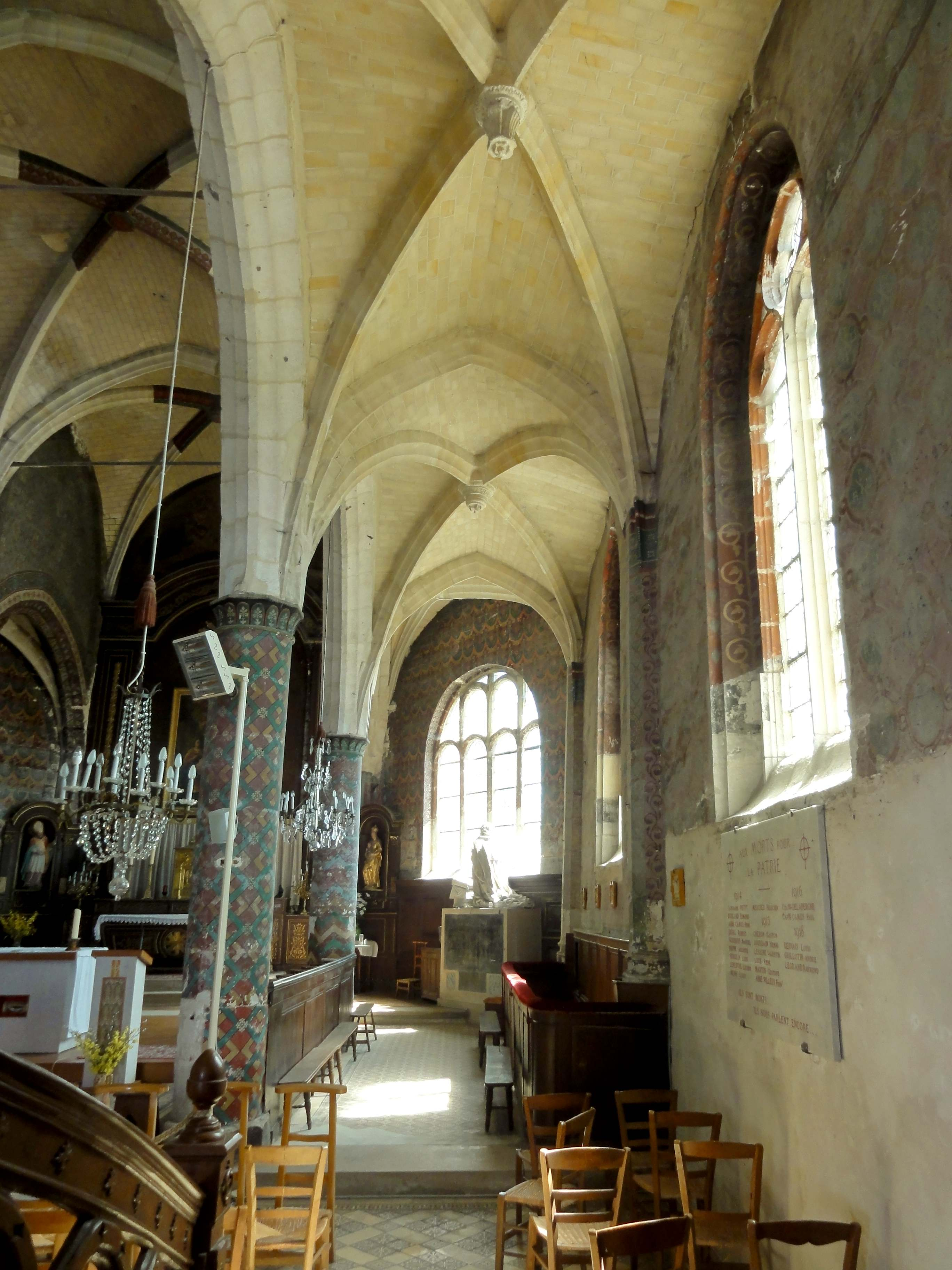 Intérieur de l'église (voir titre).